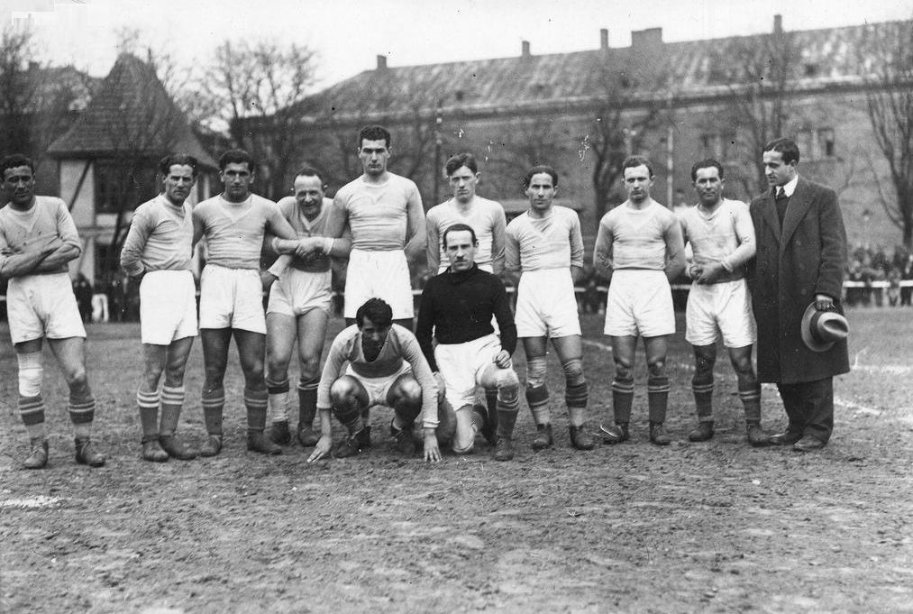 Футбольна команда "Гасмонея" (Львів)